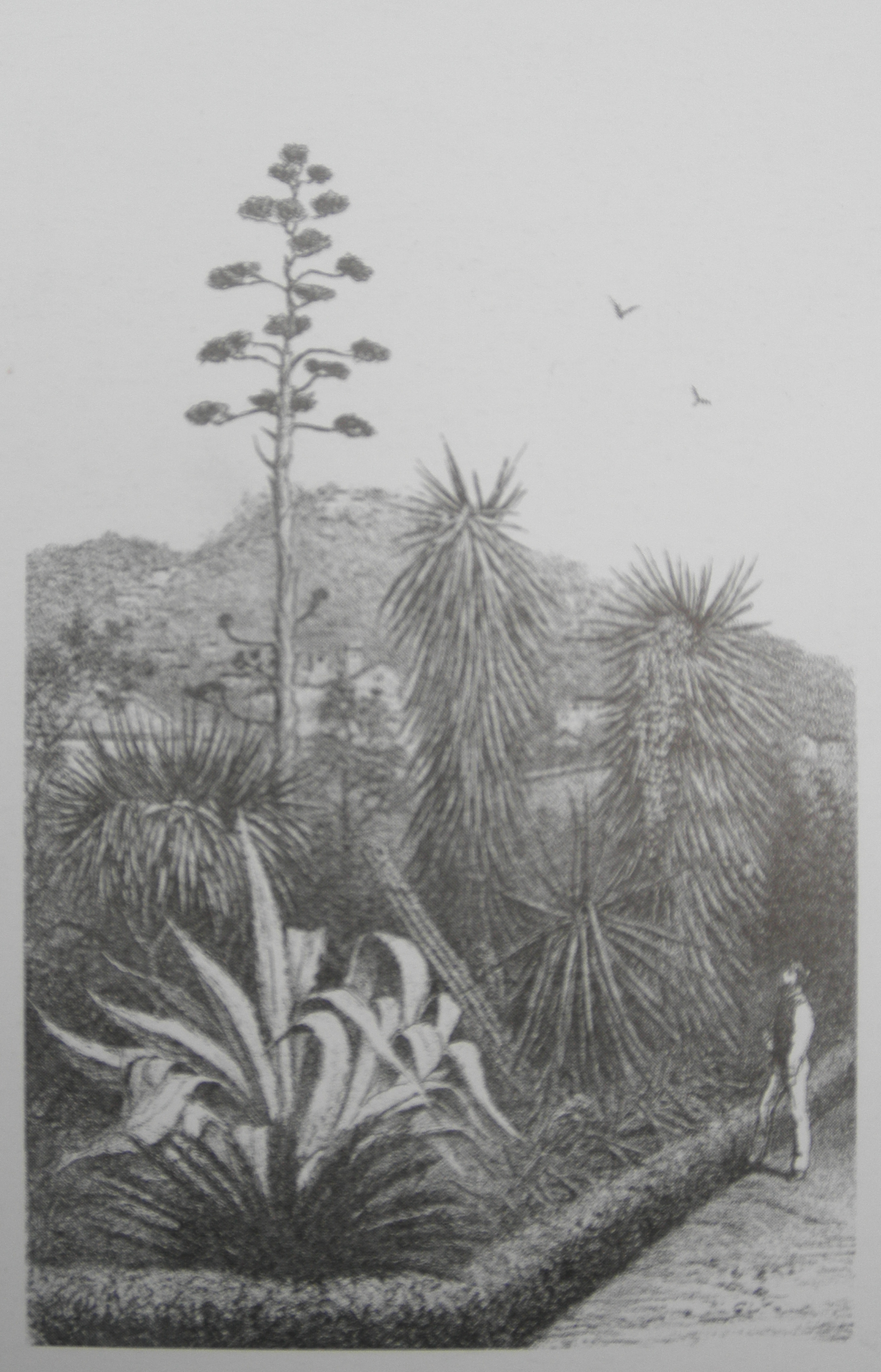 Le jardin de l’horticulteur Huber